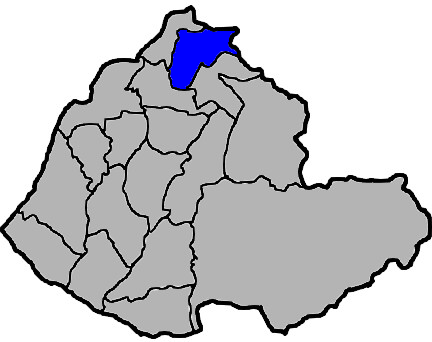 中華民國臺灣省苗栗縣頭份鎮，KaurJmeb繪製。